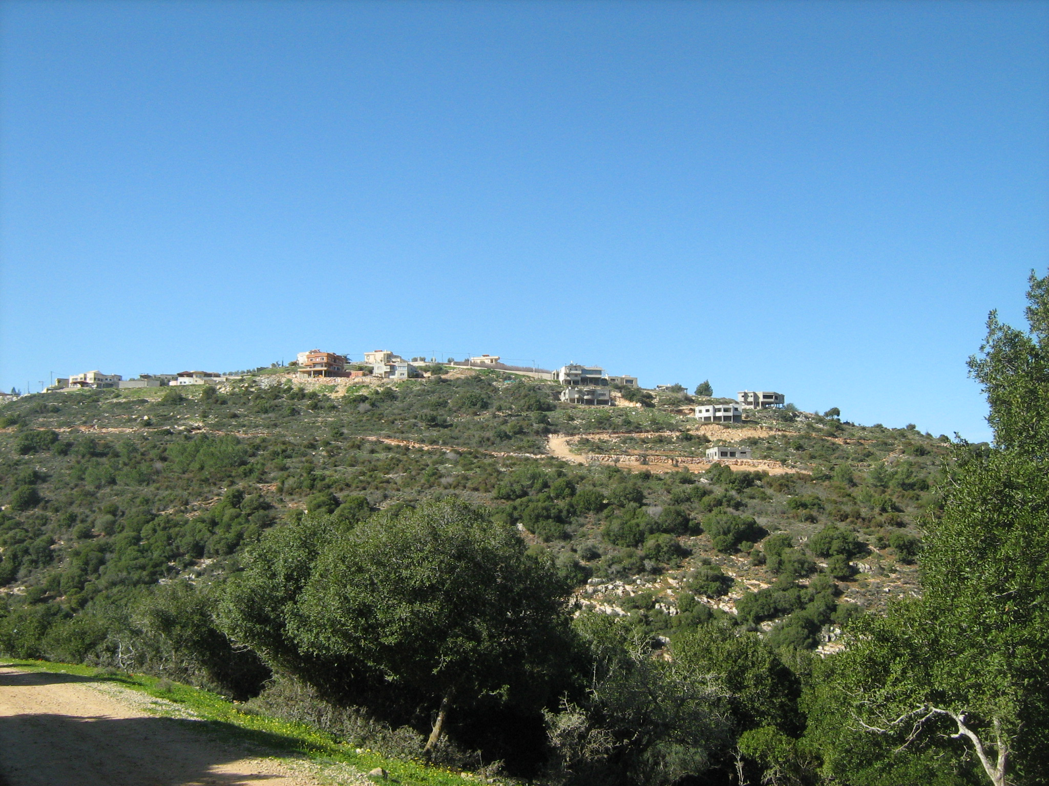 עוספיה